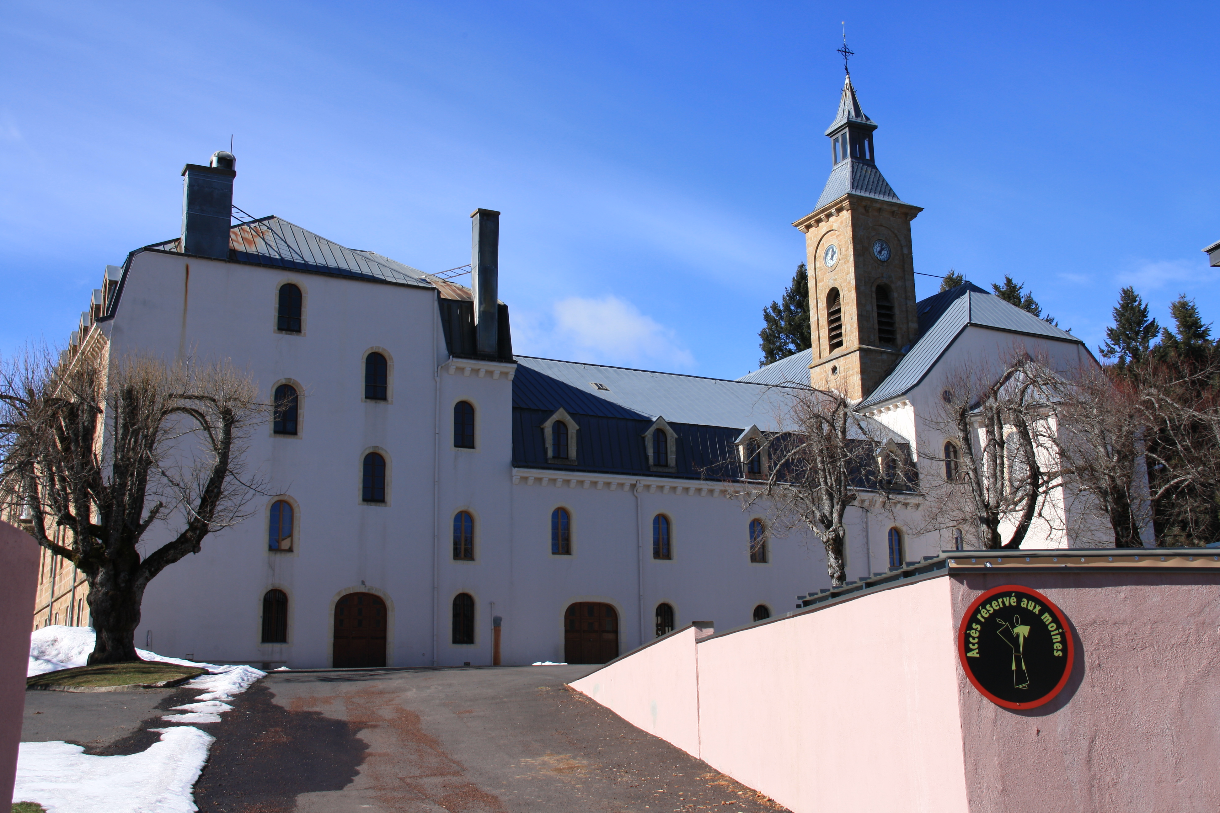 L'Abbaye Notre-Dame-des-Neiges à Saint-Laurent-les-Bains (Ardèche).